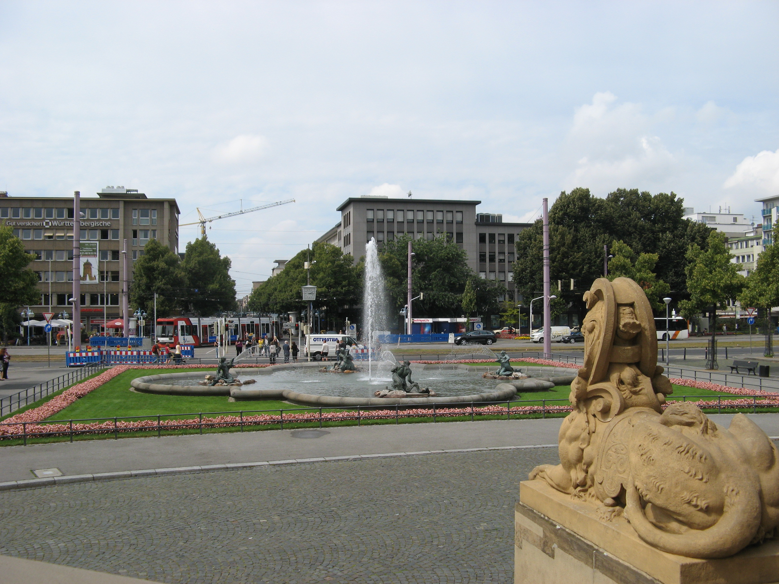 Sphinx schaut auf den Springbrunnen vor dem Mannheimer Wasserturm